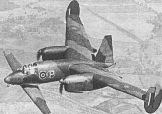 Miles M.39B experimental aircraft.